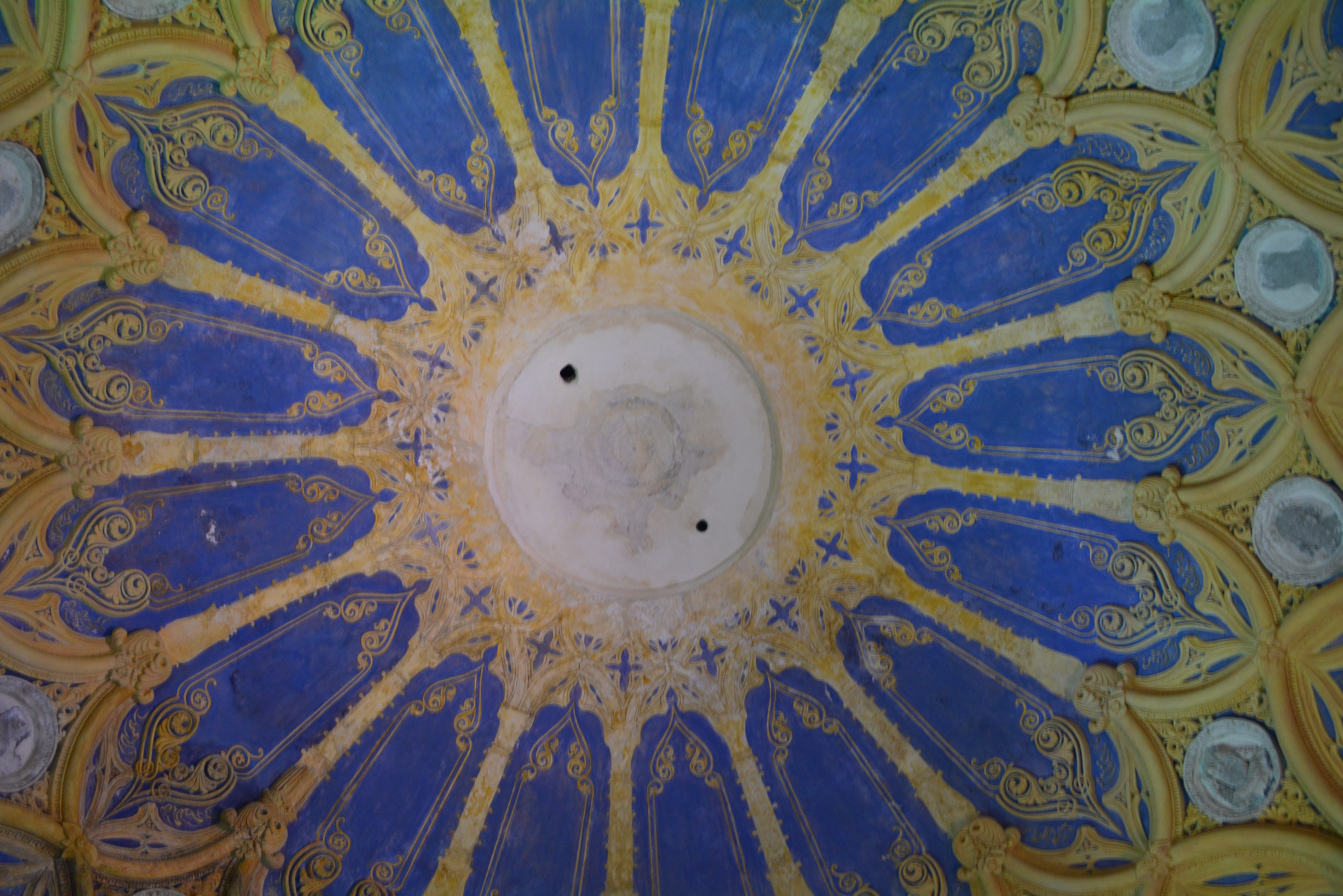 Parco e Villa Pallavicini This is a photo of a monument which is part of cultural heritage of Italy.